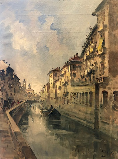 Il naviglio grande a Milano, olio su tela, 27 cm x 37,5 cm., firmato, coll. privata